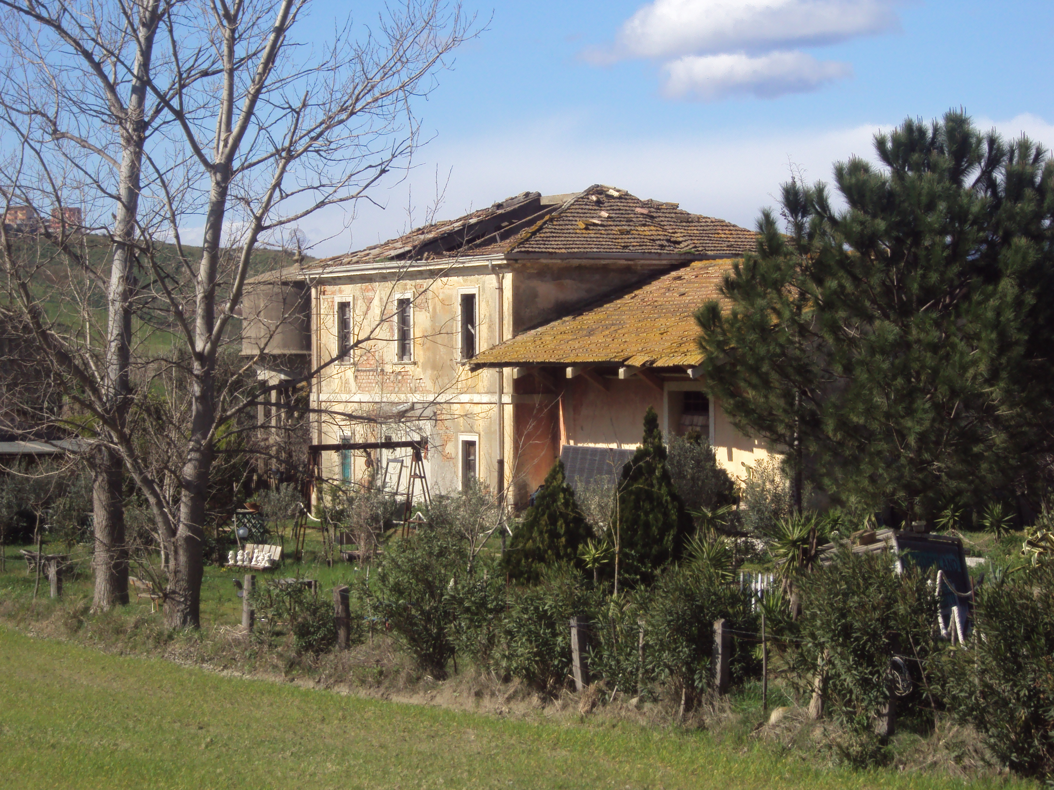 La stazione abbandonata di Papanice-Apriglianello,posizionata al km 10 della linea dismessa ex-FCL Crotone - Petilia Policastro, attiva dal 1930 al 1972